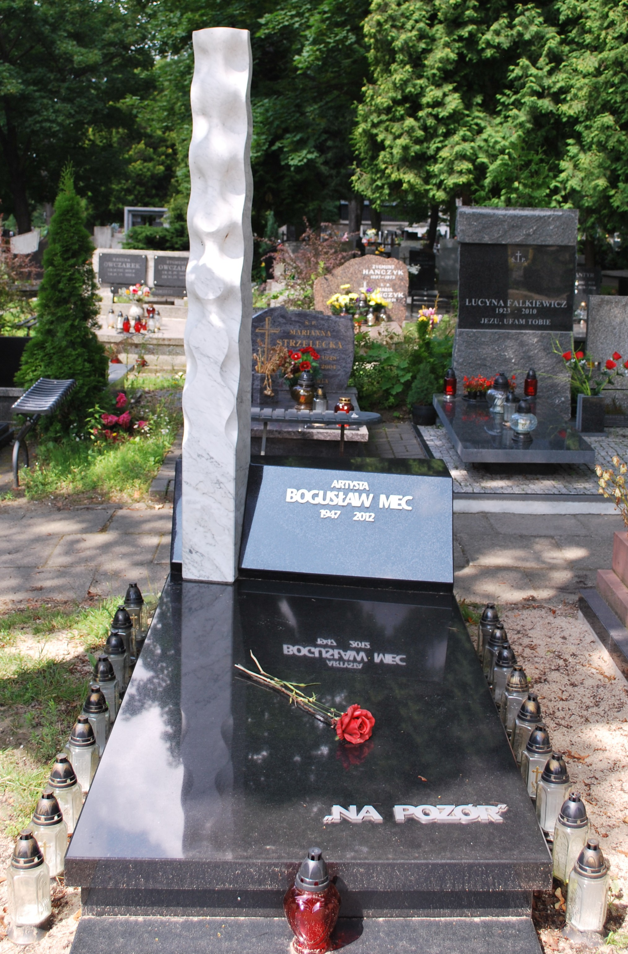 Nagrobek Bogusława Meca